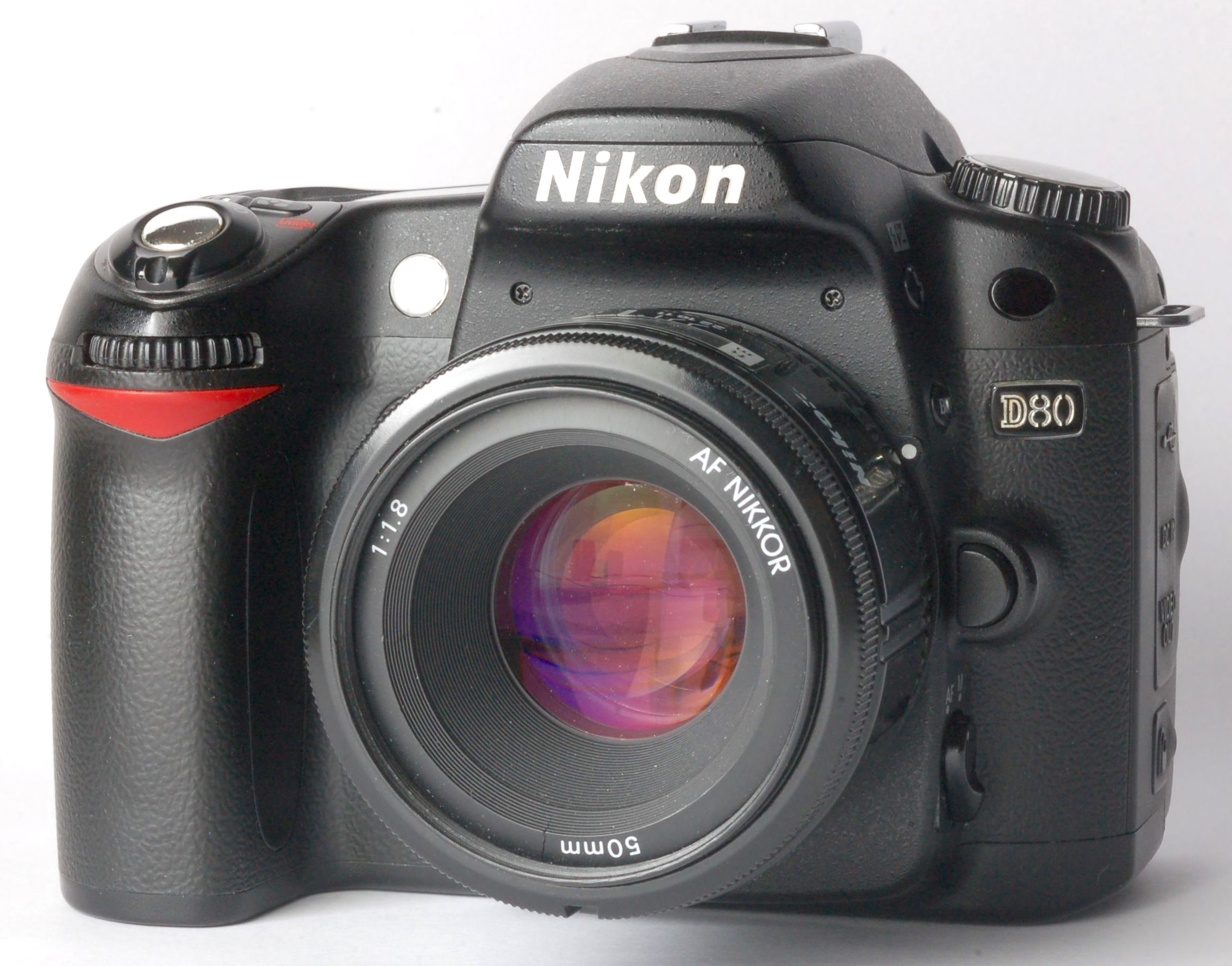 Nikon D80 with Nikkor 50 f1.8 AF Lens: Micro-Nikkor 55/3.5 P-C-Auto at f22